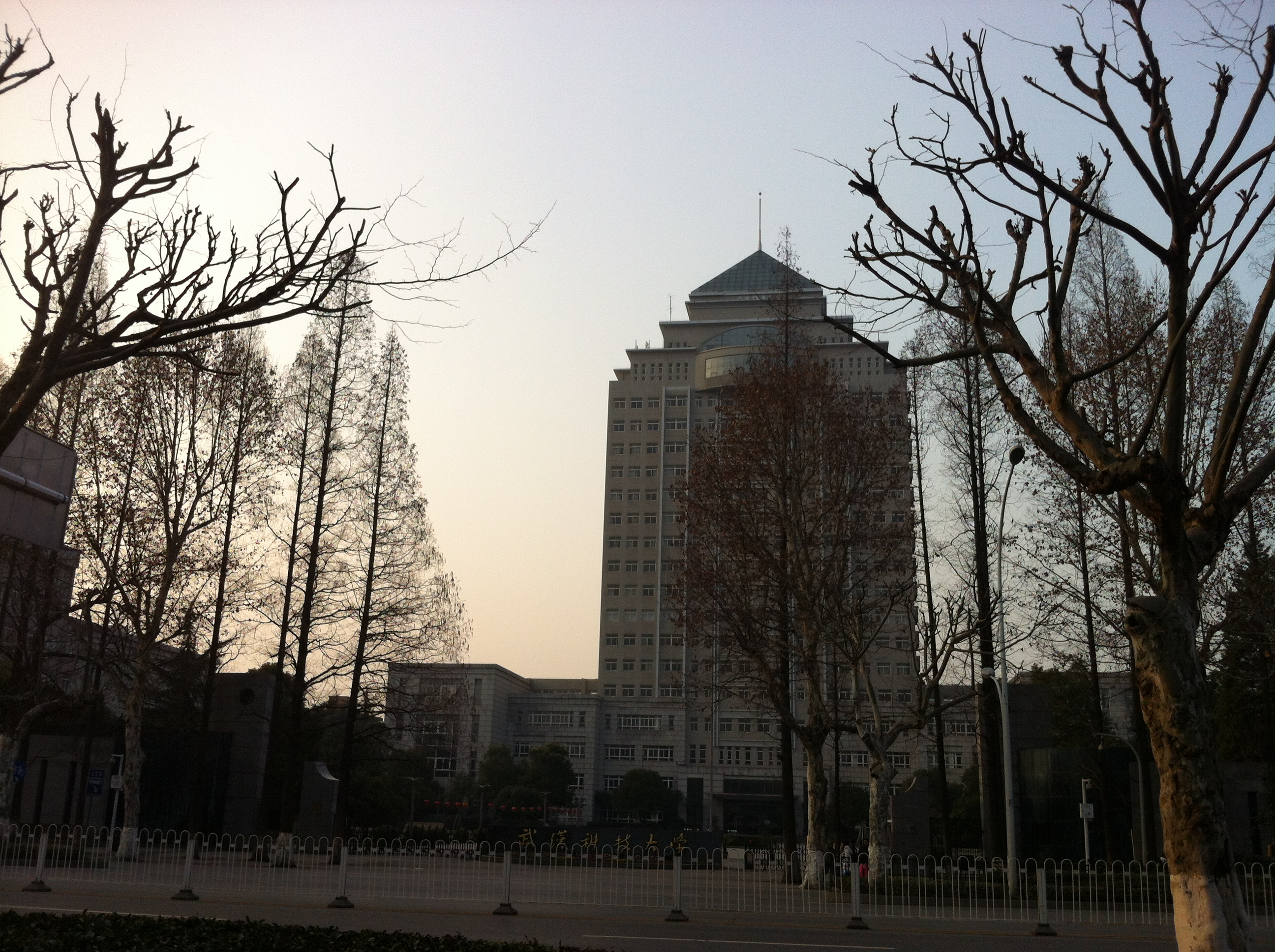 中文（中国大陆）: 武汉科技大学